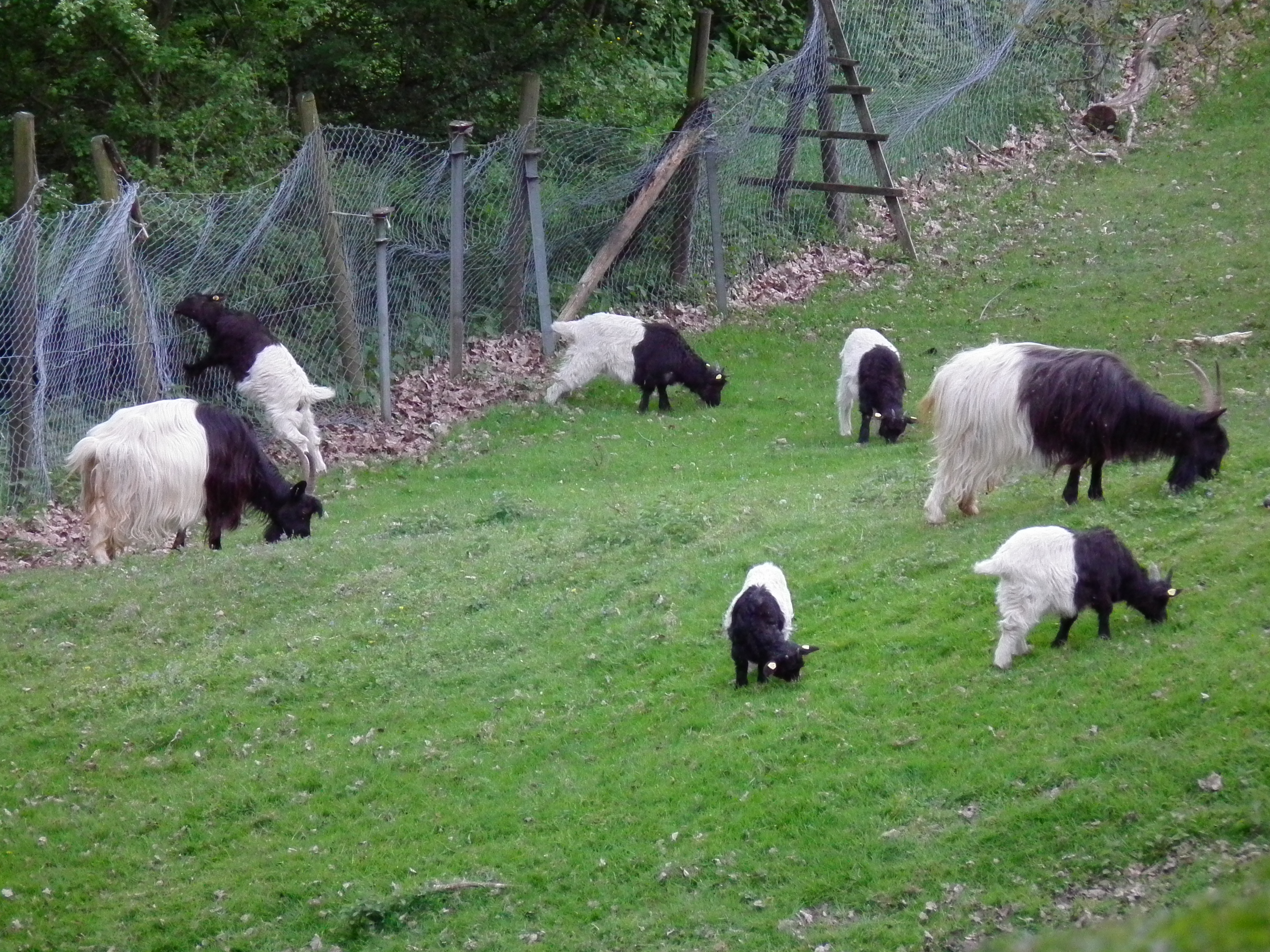 Herde Walliser Schwarzhalsziegen im Bergtierpark Erlenbach (Hessen, Deutschland)